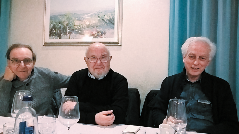 Da sinistra a detra: Giorgio Luzzi, Alfredo Luzi, Eugenio De Signoribus.